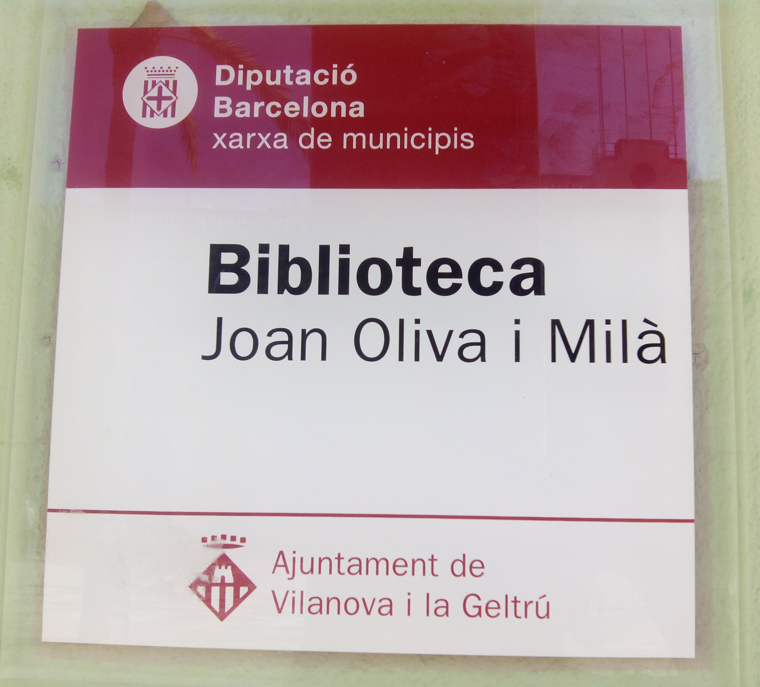 Rètol en metacrilat de la biblioteca, a la paret de l'entrada.